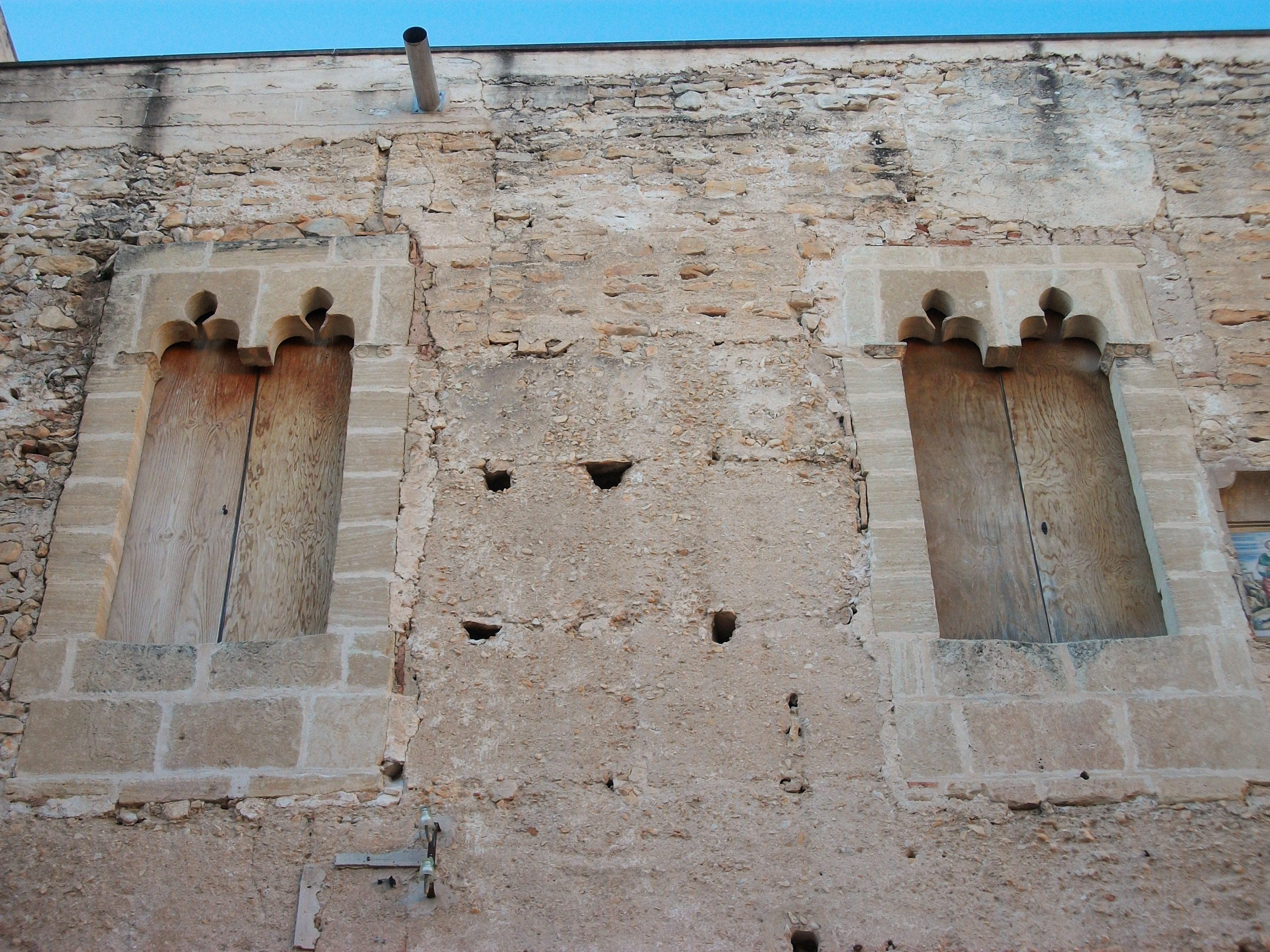 Finestres coronelles del palau dels Pròxita, Llutxent.